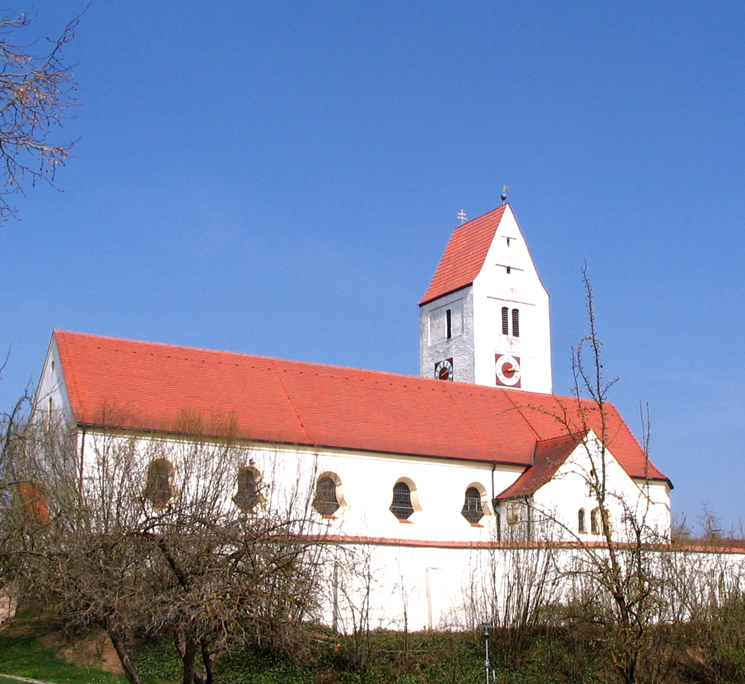 Dorfkirche St.Elisbeth in Kirchdorf (Hallertau)